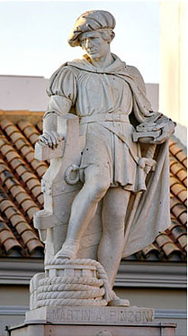 Estatua de Martín Alonso Pinzón, en Palos de la Frontera. Escultor Antonio Pinto Soldán, Exposición Iberoamericana de Sevilla de 1929. Trasladada en 1945 a Palos de la Frontera. © Miguel Ángel "fotógrafo" Citar al autor.